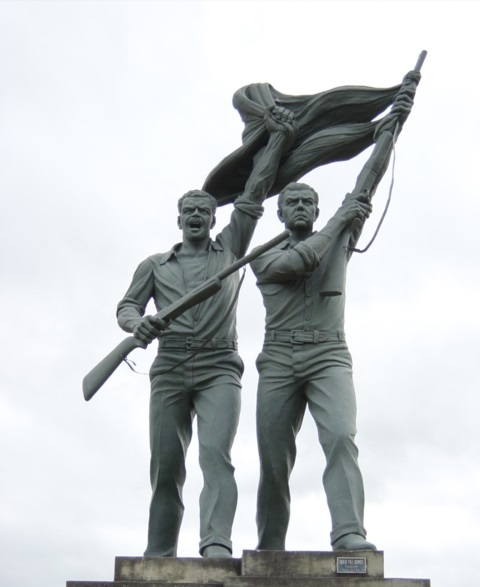 Movimiento de luchas cívicas por el 11% de las regalías petroleras en Santa Cruz.